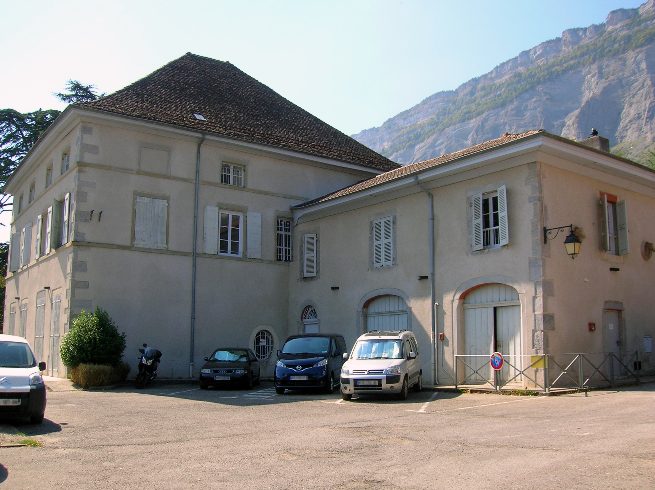 mairie de Biviers, Isère, AuRA, France.